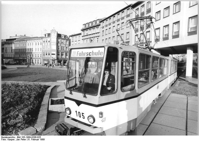 Gera, Straßenbahn ADN-ZB Kasper 6.2.89-zei. Gera: Moderne Fahrschulausbildung bei der Straßenbahn- Seit Oktober 1988 begegnet man in Gera diesen blauen Tatra-Bahnen. Sie wurden von der E-Werkstatt der Straßenbahninstandsetzung zu Fahrschulwagen umgerüstet. Beispielsweise erhielten sie einen Simulator, mit dem verschiedene Störungen vorgegeben werden können. -siehe auch 1989-0206-24N- Achtung! Hierzu erhalten Sie am 7.2. eine ADN-Meldung. Information added by Wikimedia users.